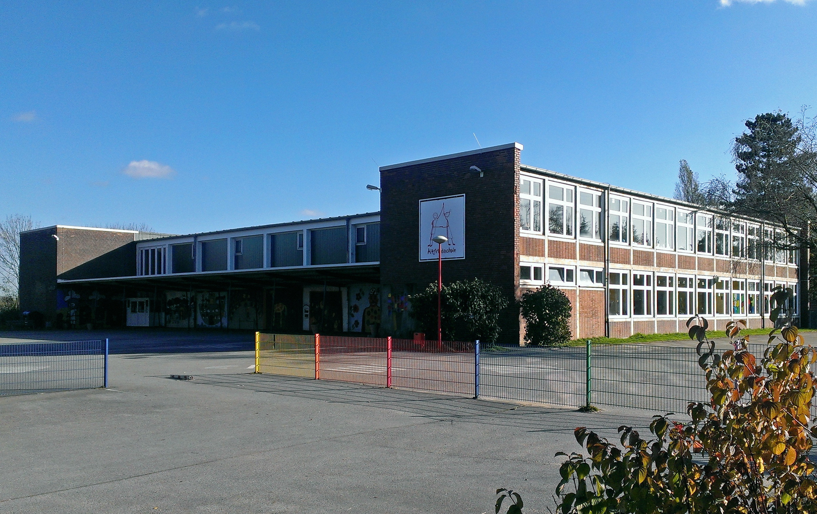 Grundschule Altfriedschule in Essen-Frintrop, erbaut 1960